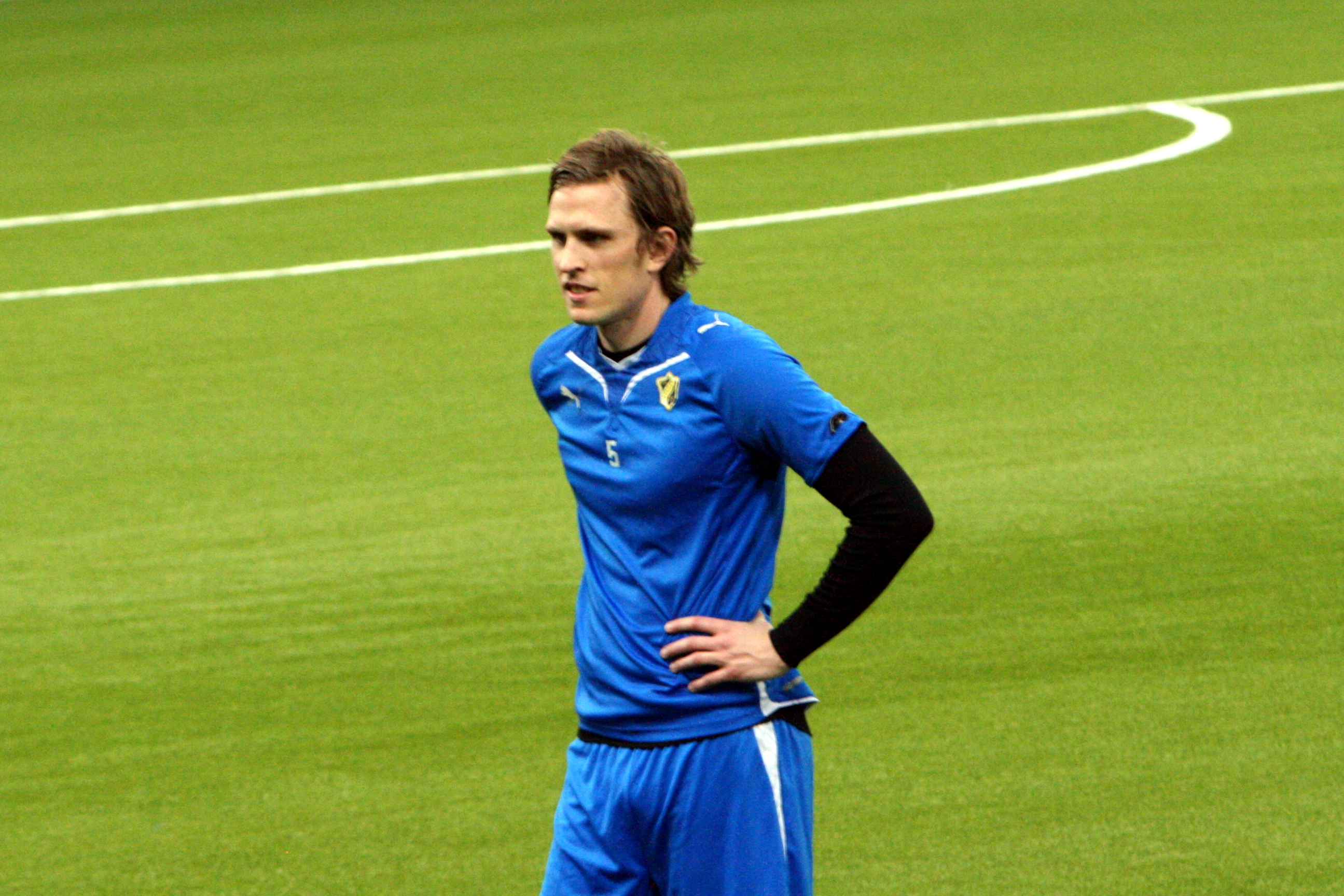 Pontus Segerström, Stabæk-spiller